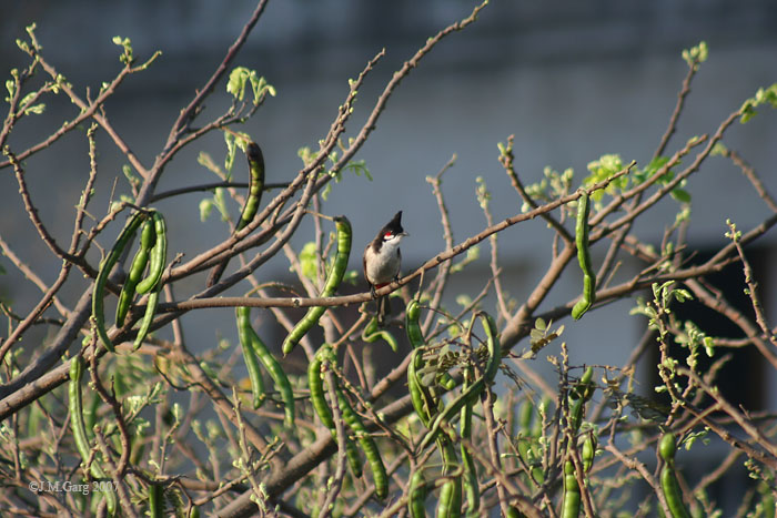 Vilaiti Siris Samanea saman in Kolkata, West Bengal, India.